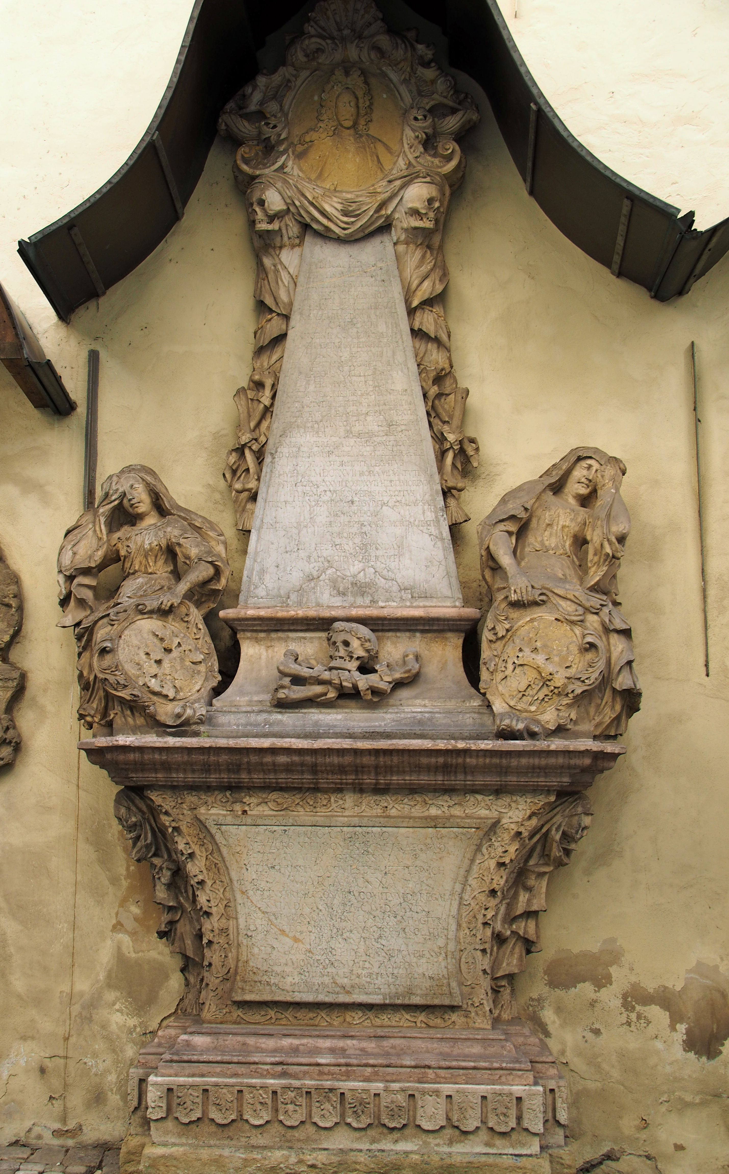 Epitaph Ernst Eberhard Reichsgraf von Metternich (* 17. März 1691 † 1. Juli 1717), Geheimer Rat und Mit-Gesandter seines Vaters für den König von Preußen, bevollmächtigt für das Bistum Magdeburg am Reichstag zu Regensburg . Begraben auf dem Gesandtenfriedhof an der Dreieinigkeitskirche Regensburg (Südseite). Epitataph erst 10 Jahre nach seinem Tod errichtet